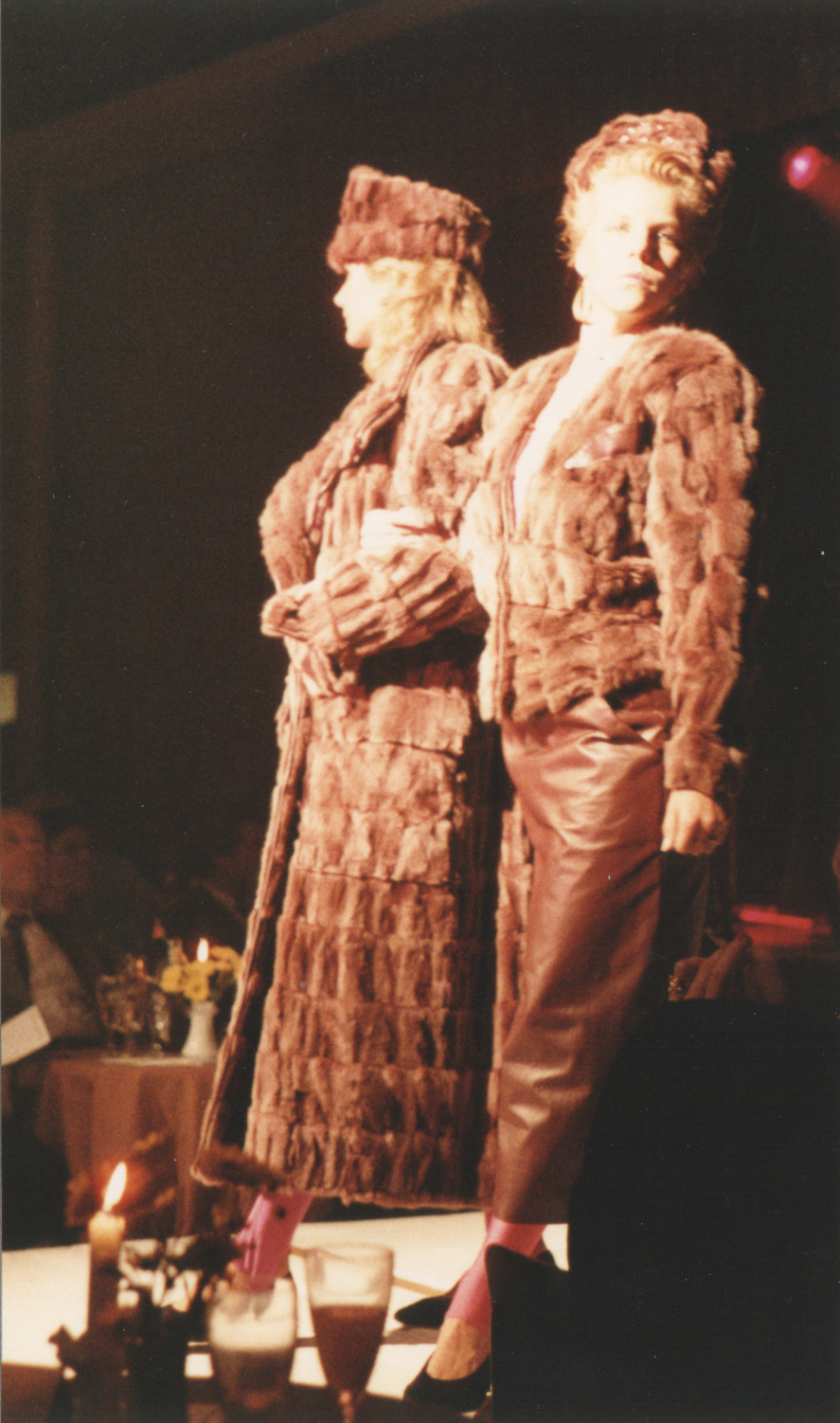 Pelzmodelle Kuhn, Klaus-Peter Kuhn Modenschau im Düsseldorfer Malkasten Jacke, Mantel und Kappe aus bordeaux gefärbten, chinesischen Katzenklauen